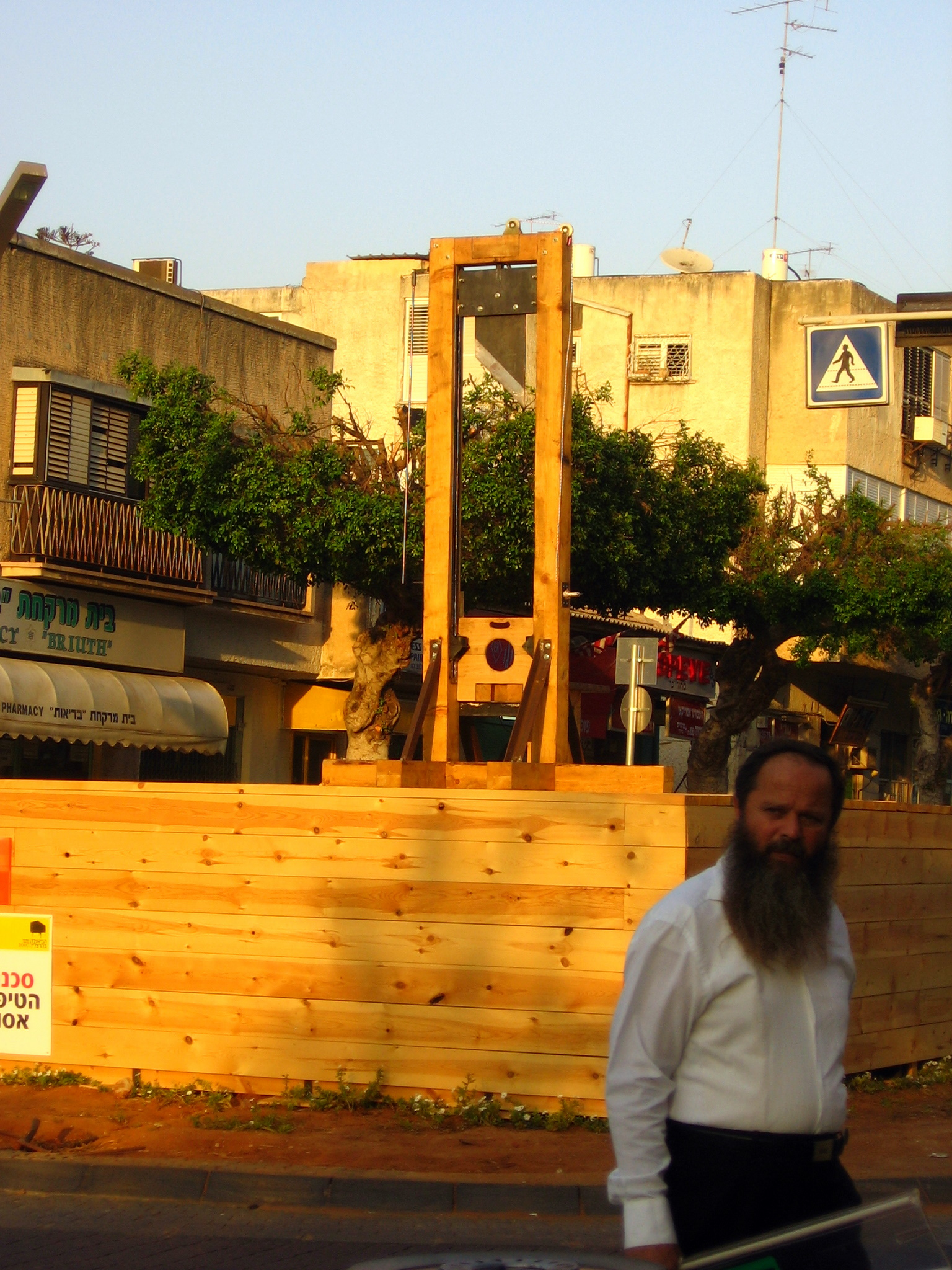 Ariel Kleiner, Guillotine - Herzliya Biennial, Israel